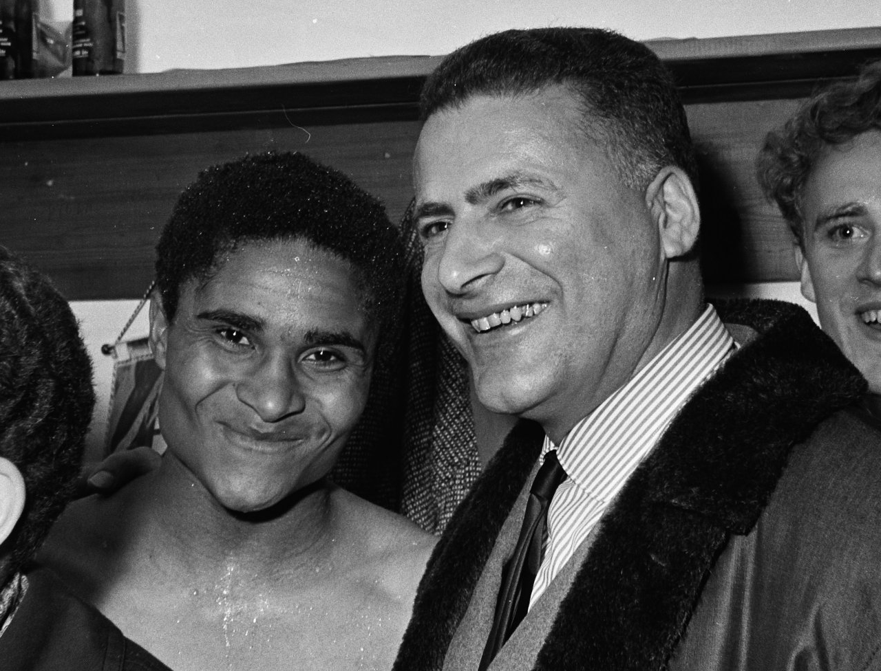 Feijenoord tegen Benfica 0-0. Eusébio met Leo Horn.